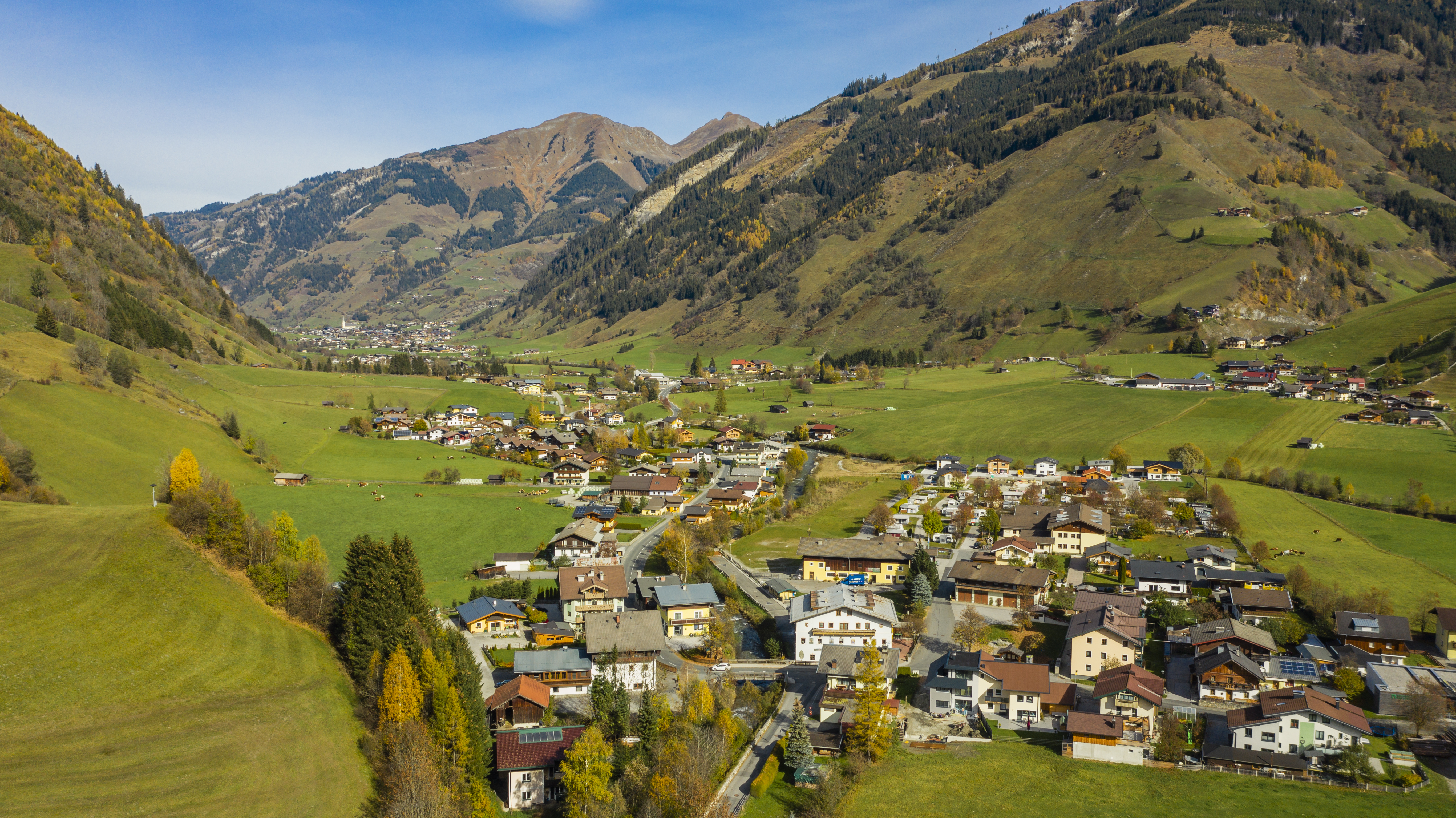 Rauris, Blick in Richtung Rauris-Wörth